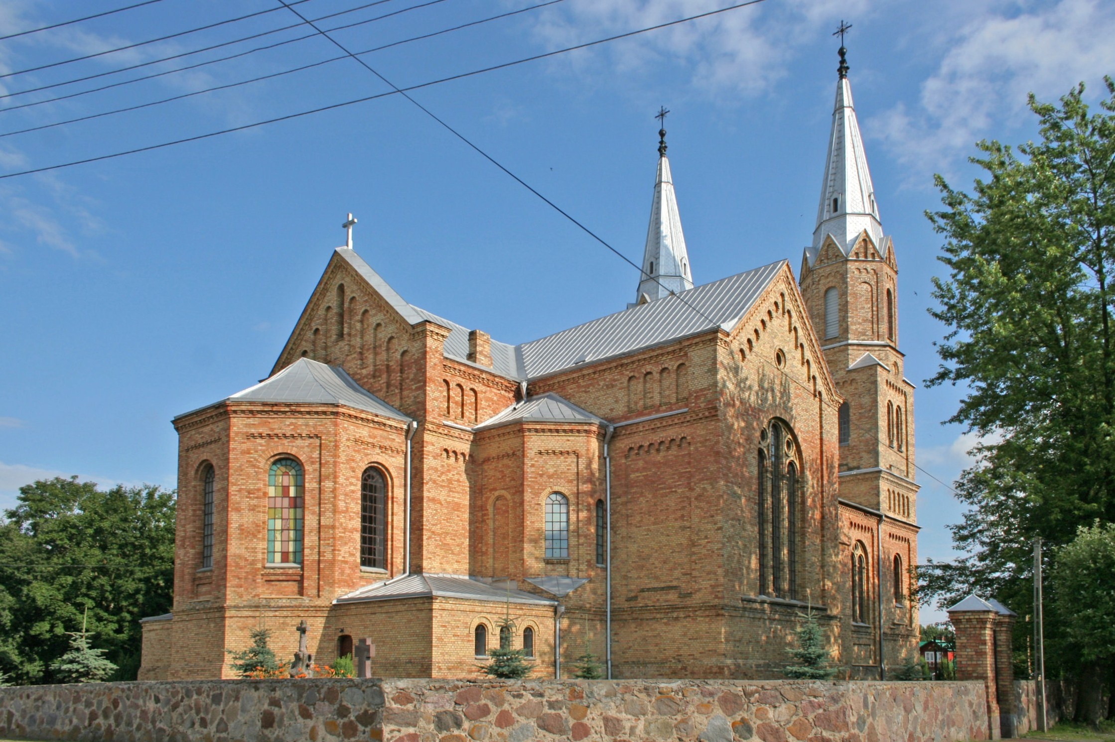 Kościół św. Jerzego w Janowie.